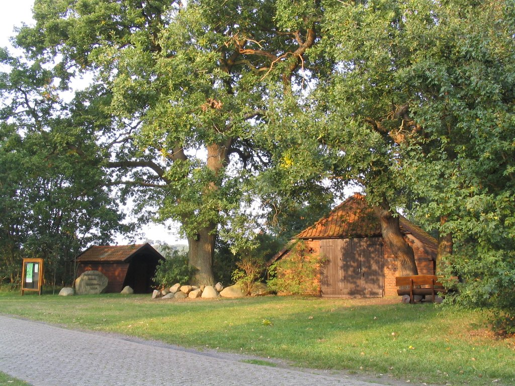 Astruper Schafstall (Landkreis Oldenburg, Niedersachsen) - heutzutage Veranstaltungsgebäude